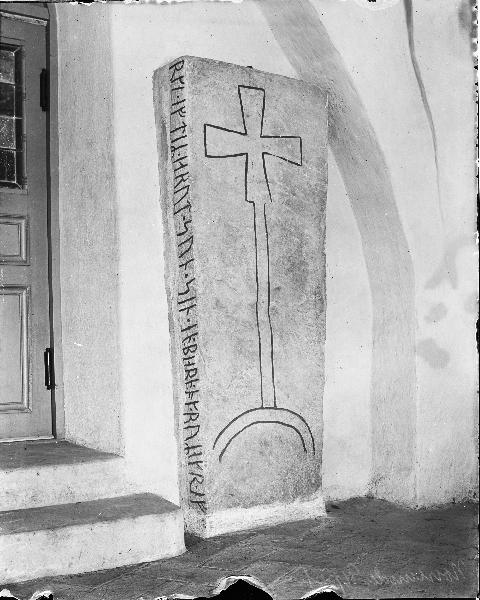 Gravhäll med runskrift stående fastmurad i vapenhuset. Kategori: (09) Runstenar, bildstenar Gravhäll med runskrift stående fastmurad i vapenhuset.